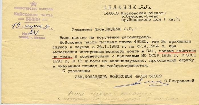 Письмо О. Г. Щедрину от зам. командира в/ч 55339 С. Покровского, №231 от 19 апреля 1991 г. Подобные отписки получали и многие «сирийцы».